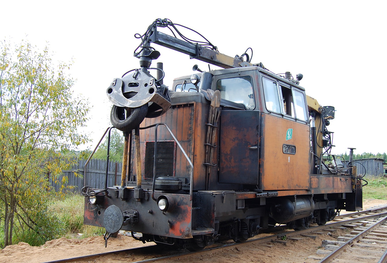 Тепловоз ТУ6Д-0336, Удимская УЖД